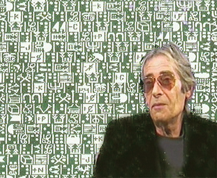 Portrait de Roland Sabatier